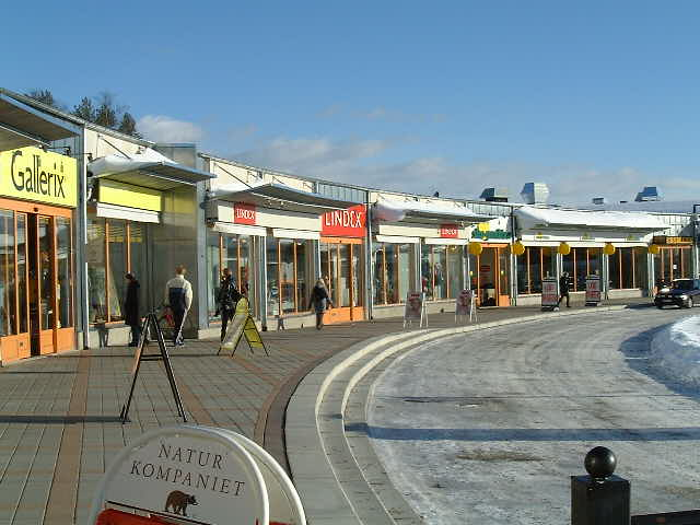 Strömpilen, Umeå, Västerbotten, Sverige